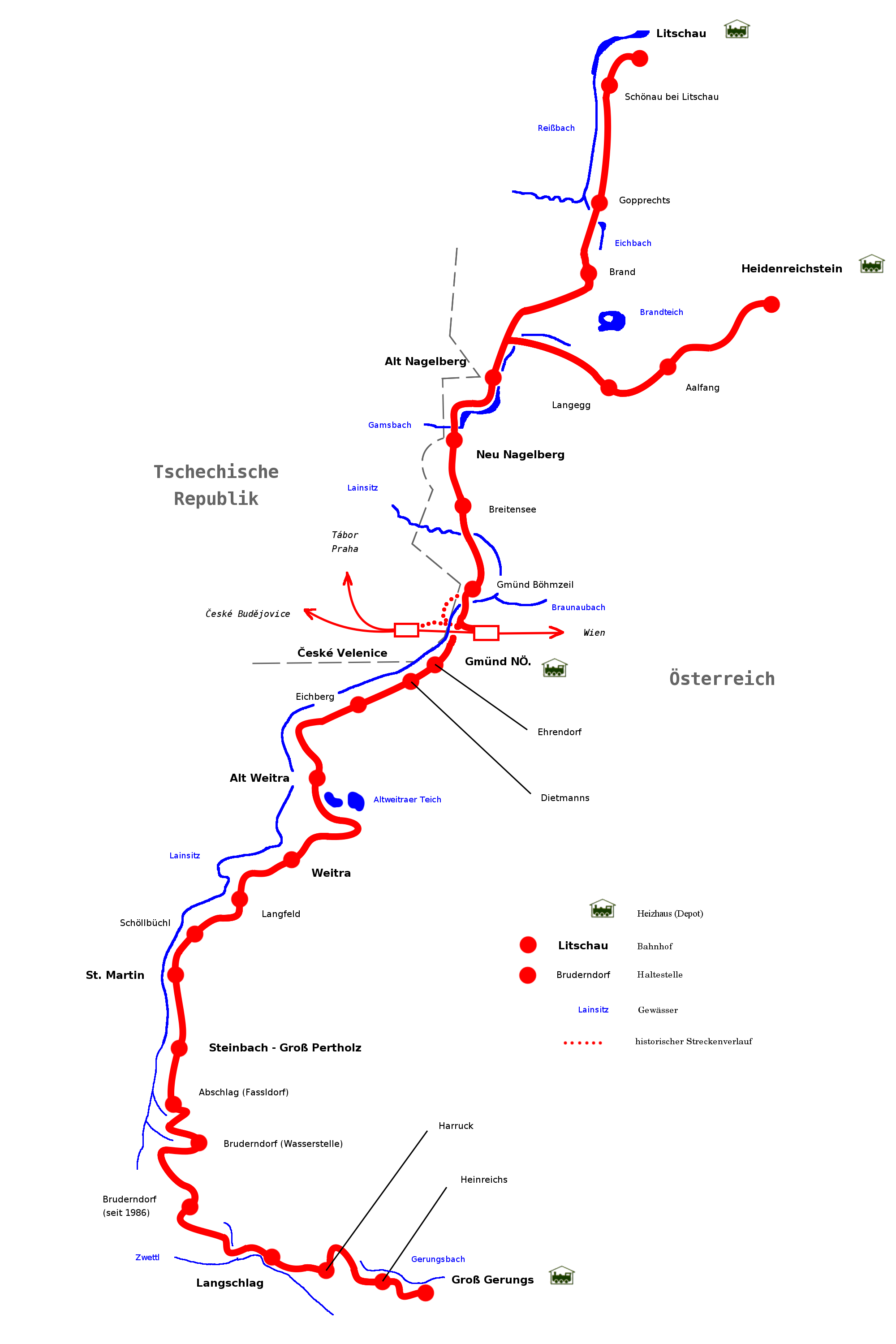 Map of the Waldviertler Schmalspurbahnen (Waldviertel narrow gauge railways) in Lower Austria - Karte der Waldviertler Schmalspurbahnen in Niederösterreich